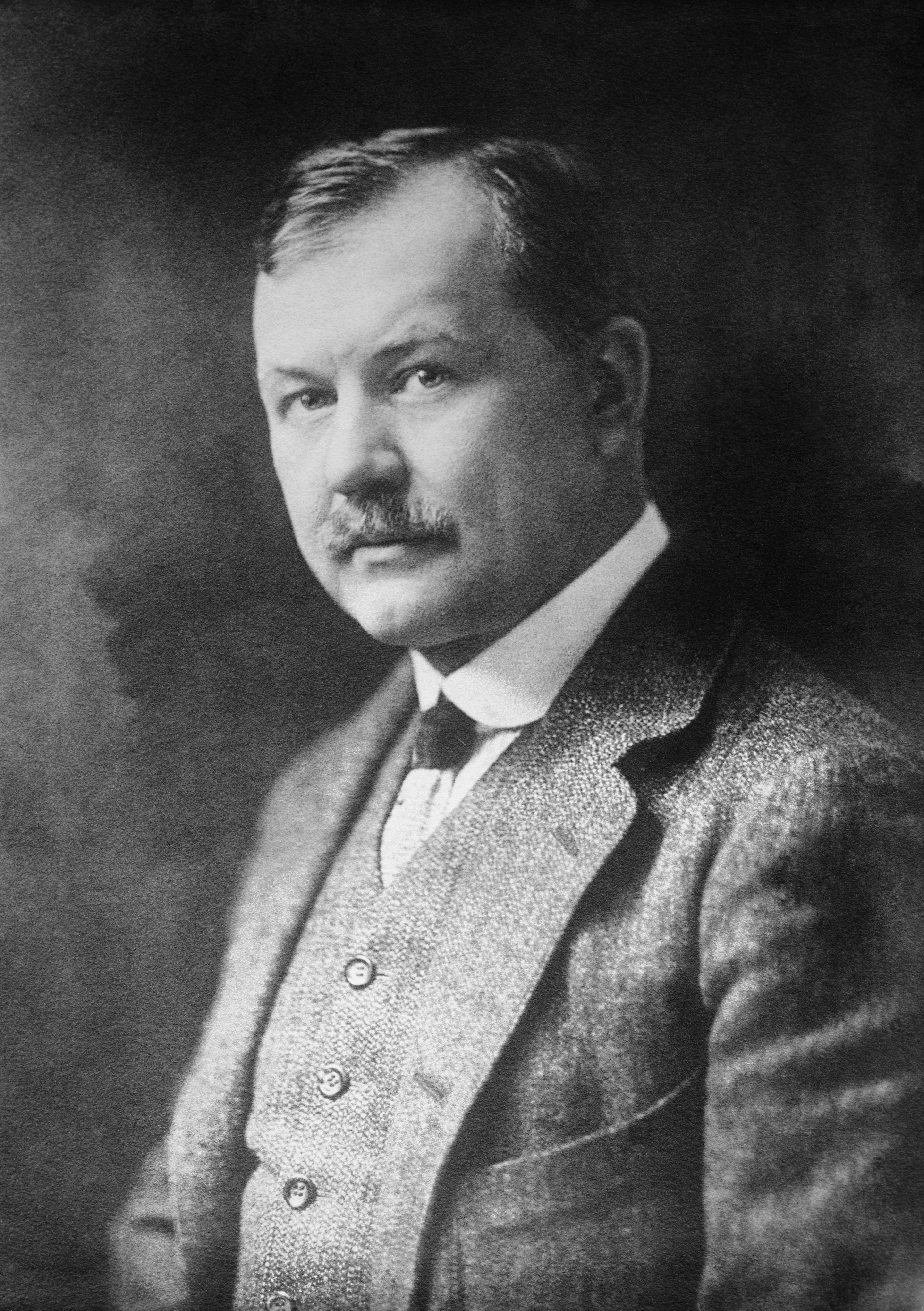 Austrian composer Franz Lehár (1870-1948)